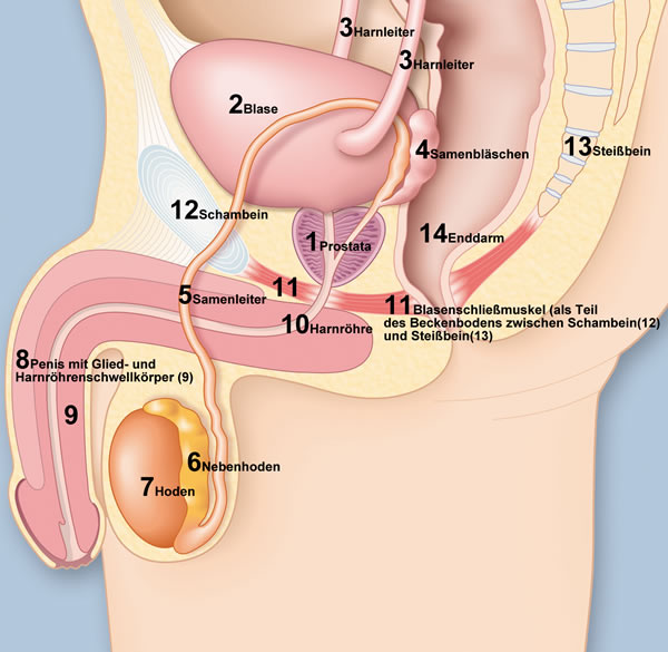 Soomaaliga: soomaali